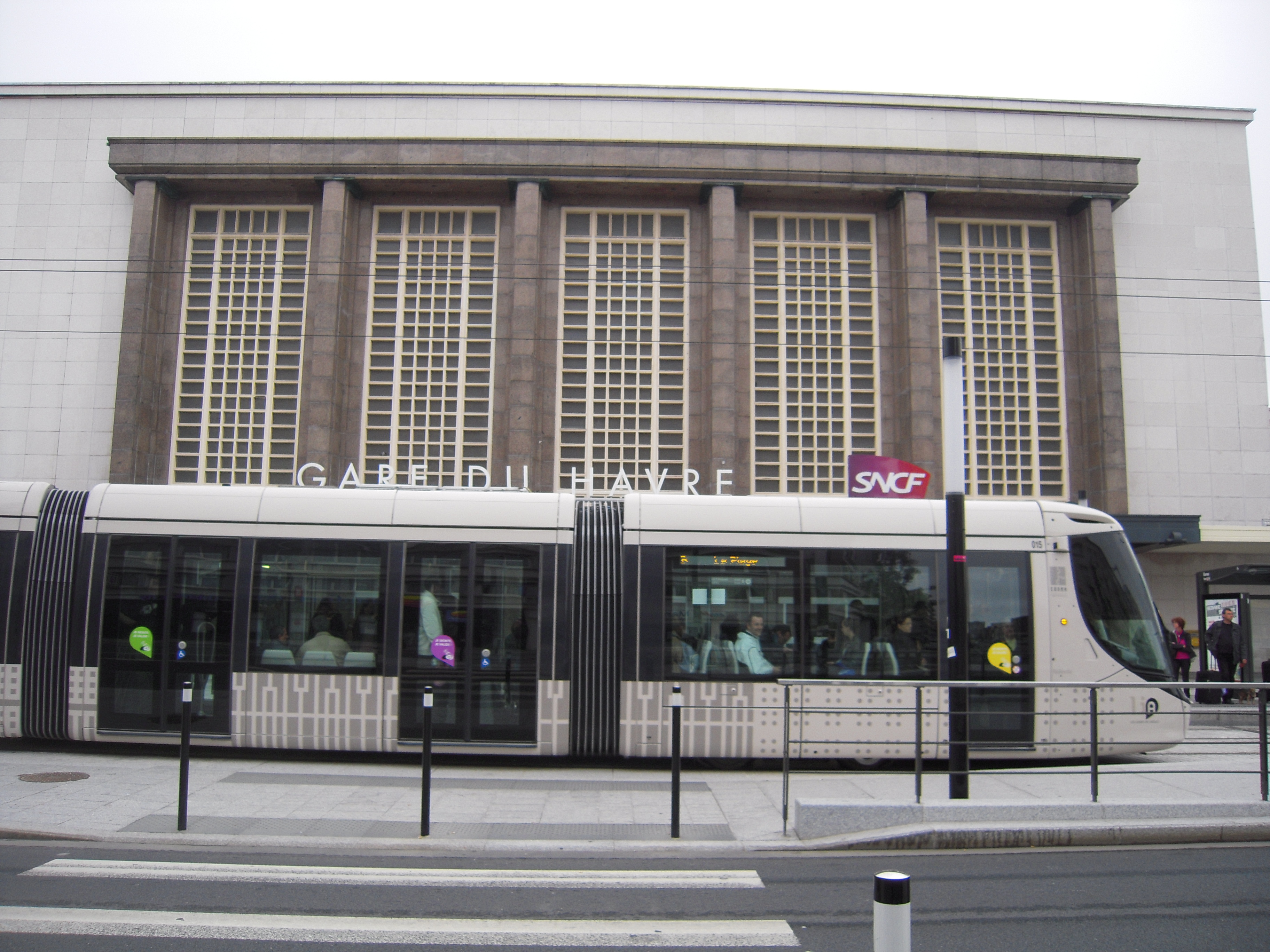 Gare du Havre et tramway, en septembre 2013.